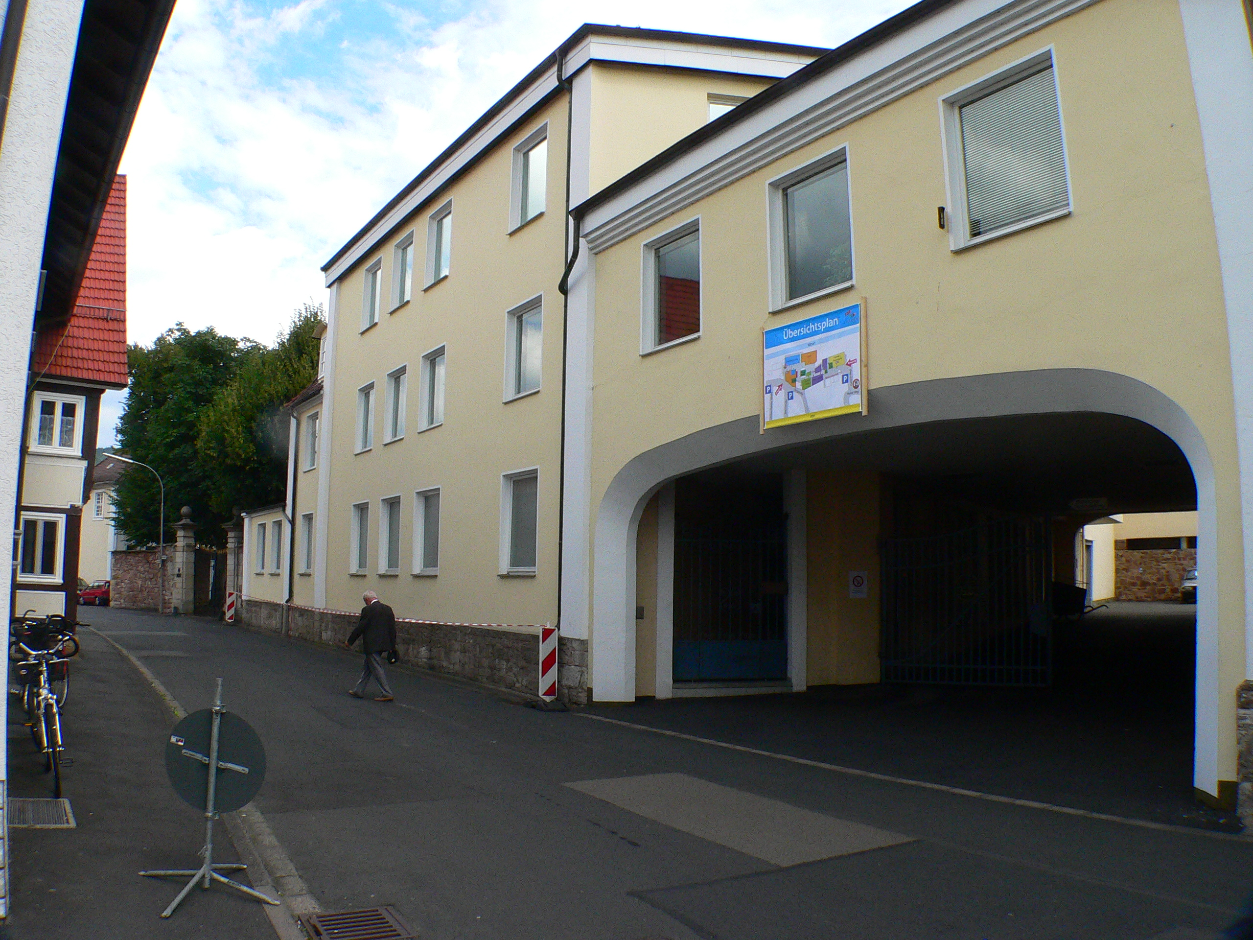 Farbenfabrik Habich Farben in Veckerhagen (Reinhardshagen), Weserbergland, Hessen – Fabrikeinfahrt, 1914 auf den Fundamenten der abgebrannten Alten Burg erbaut.